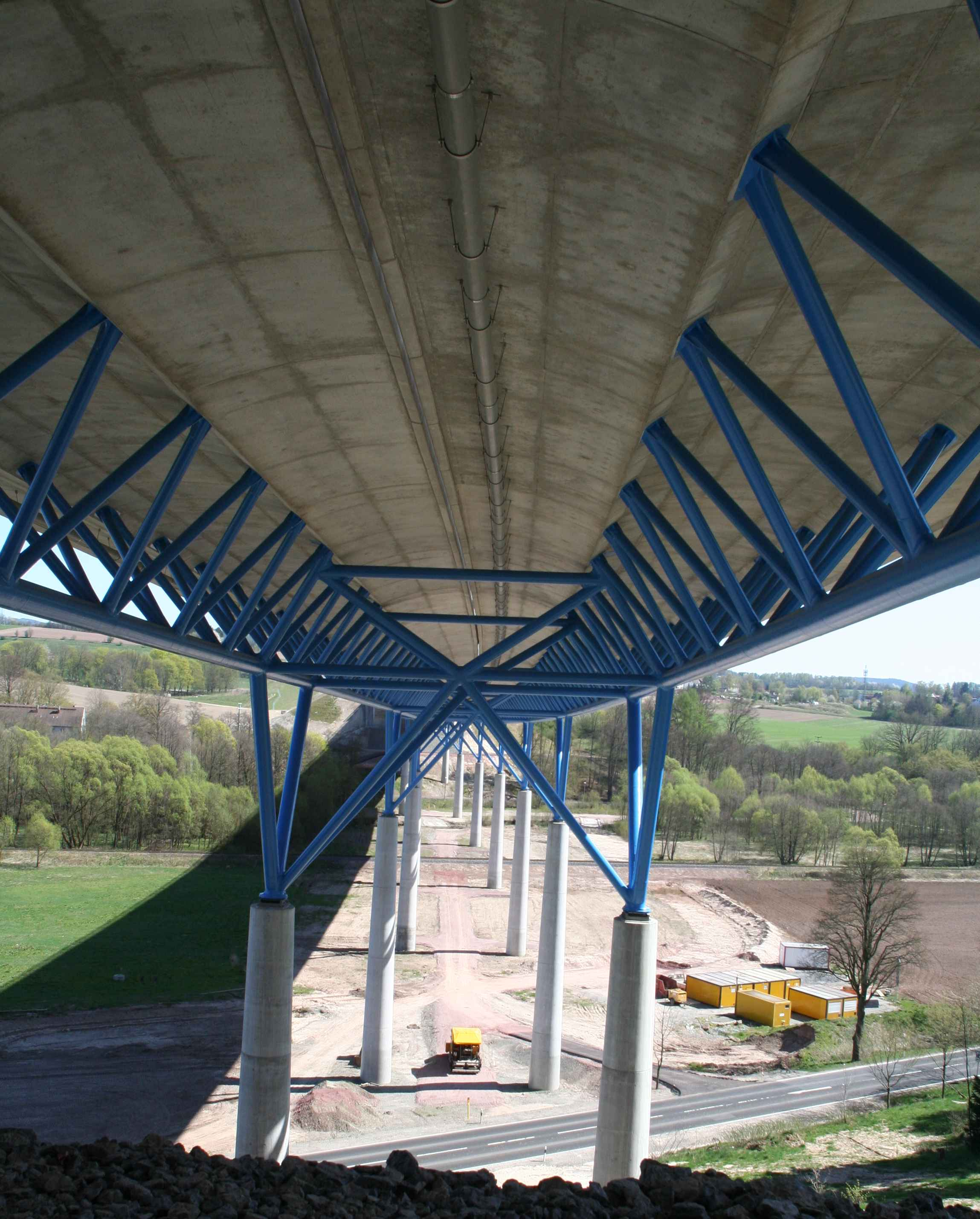 Talbrücke St. Kilian Bundesautobahn A73 bei St. Kilian, Landkreis Hildburghausen